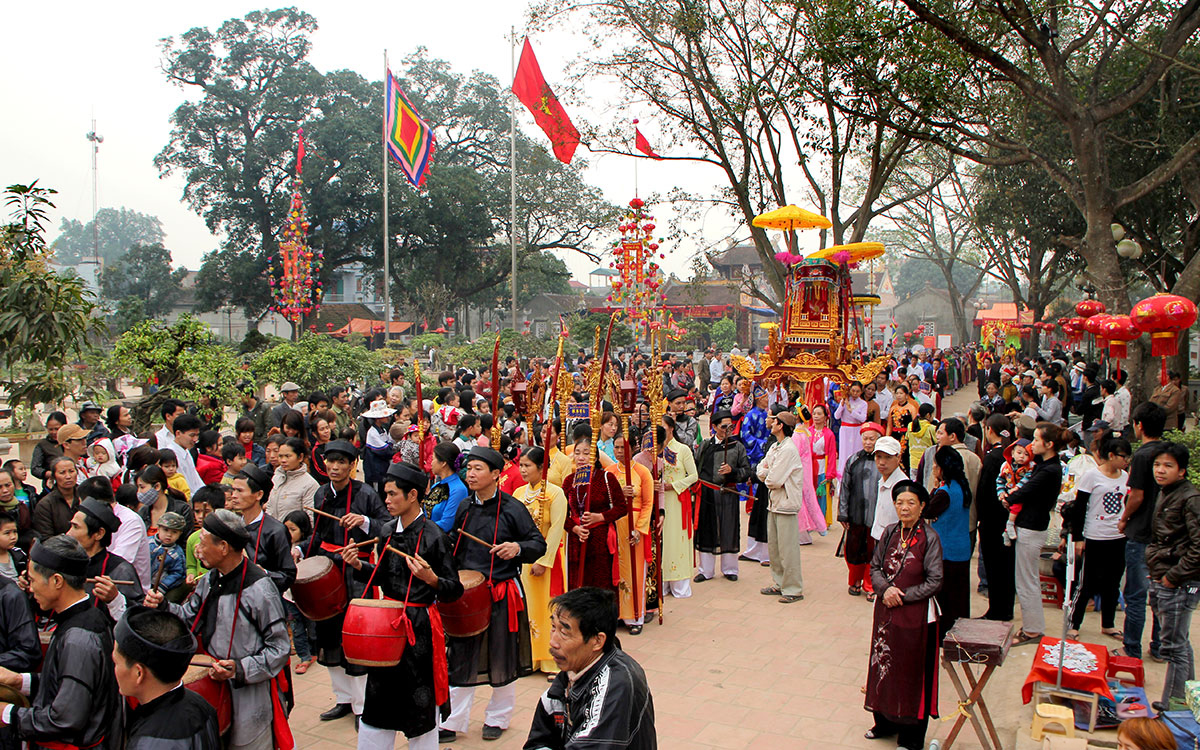 Rước Thánh trong lễ hội